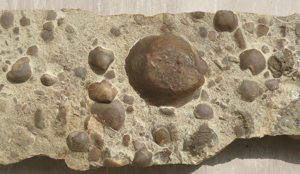 Grabgemeinschaft verschiedener Bivalven und Brachiopoden:u.a. Pleuronectites laevigatus, Entolium discites, Coenothyris vulgarisOberer Muschelkalk, Trochitenkalk-Formation, Crailsheim-SubformationHohenlohe, Deutschland